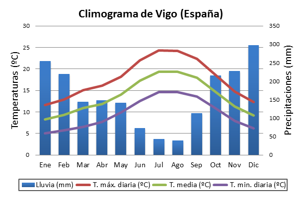 Climograma de la ciudad de Vigo